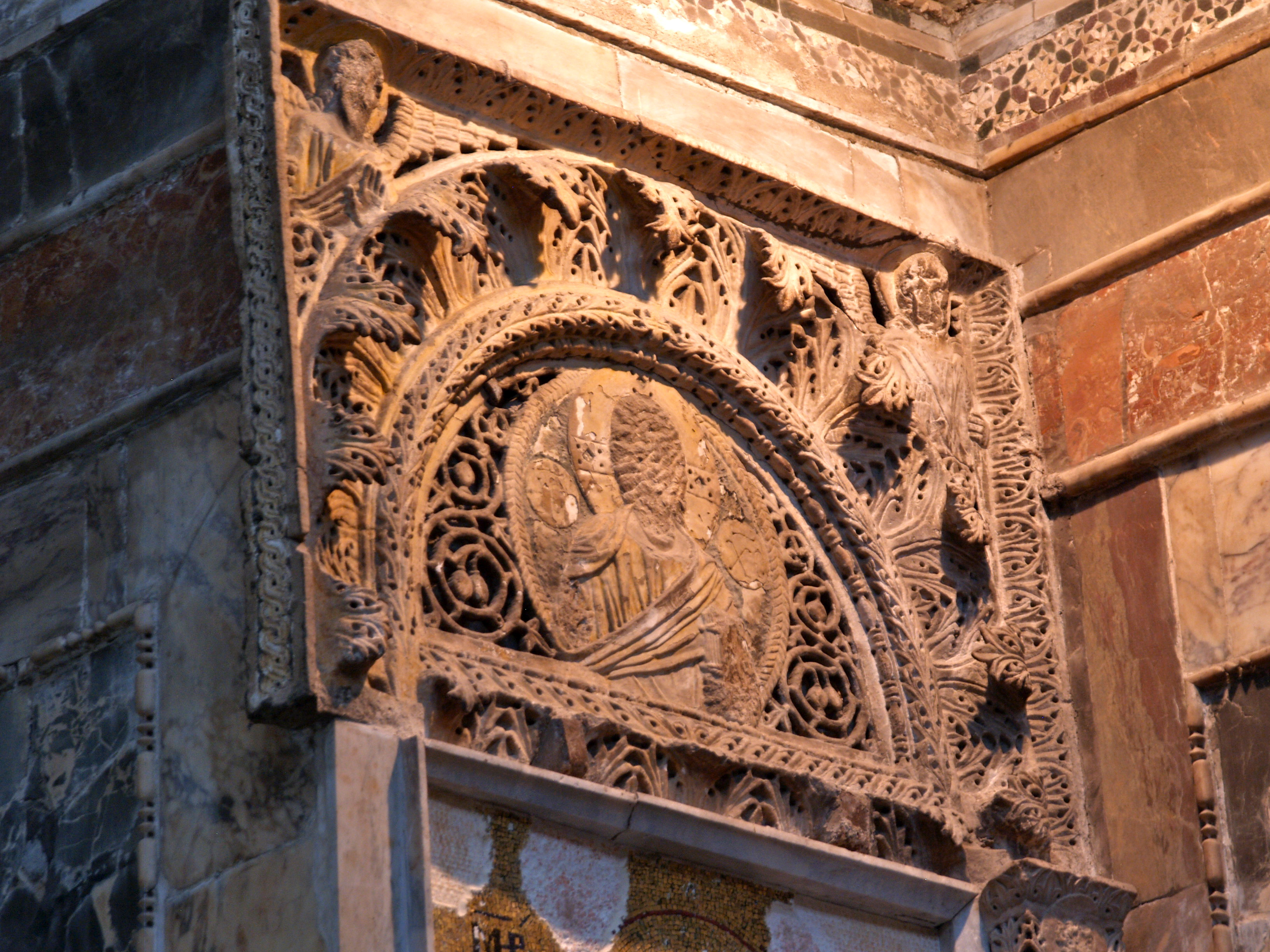 Turkey, Istanbul, Chora Museum (Kariye)